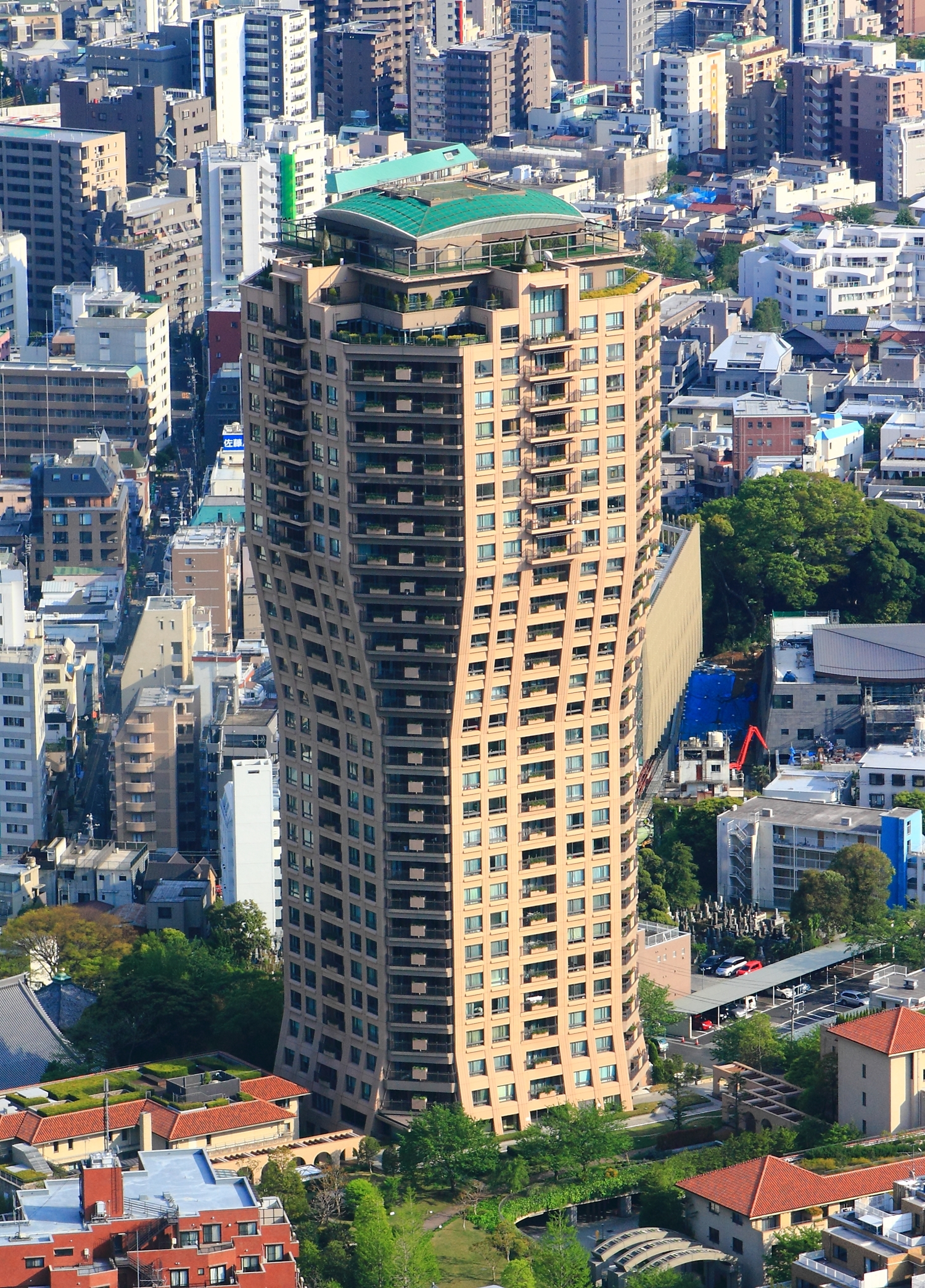 元麻布ヒルズ（東京都港区）